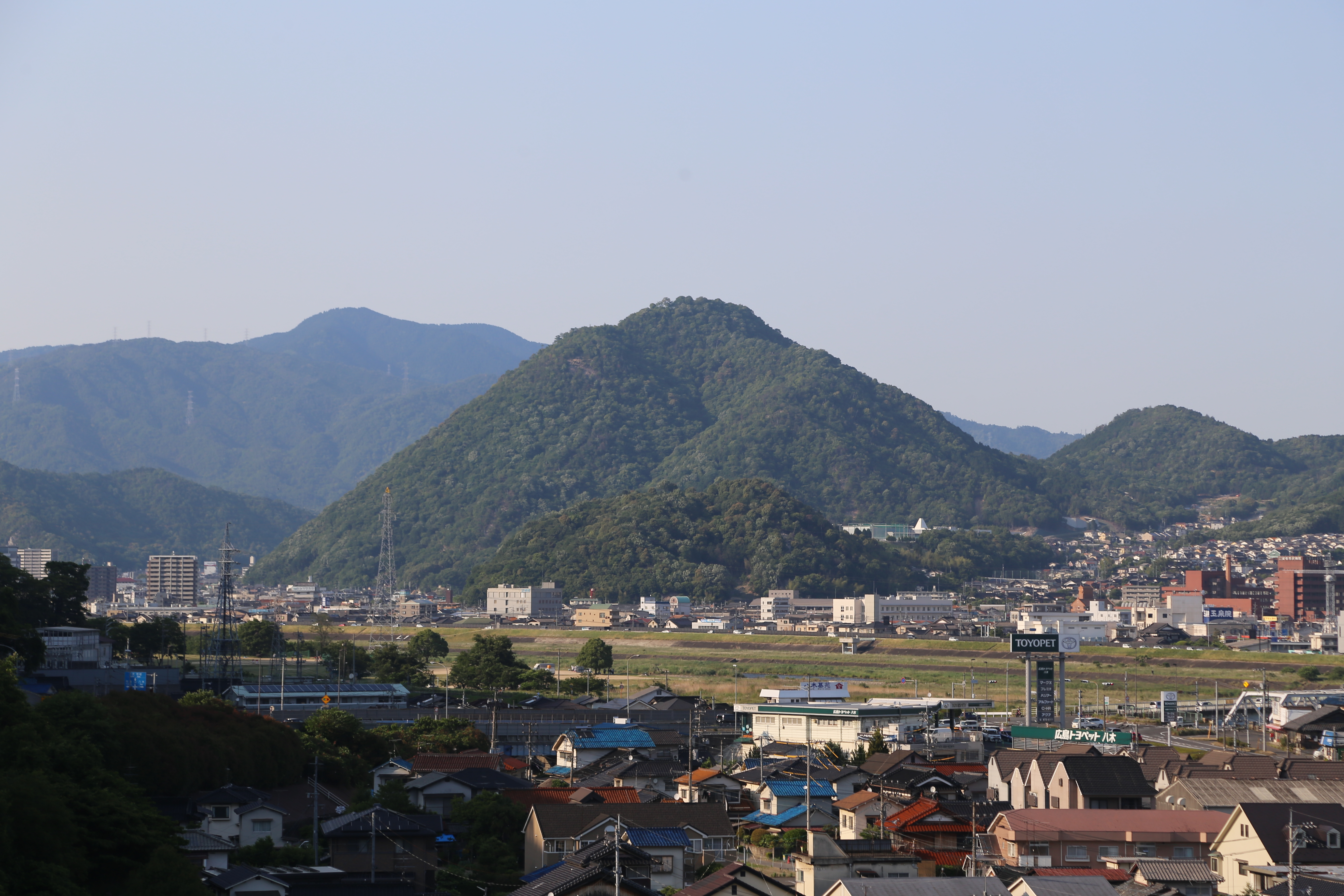 三入高松城（広島県広島市） Canon EOS 6D